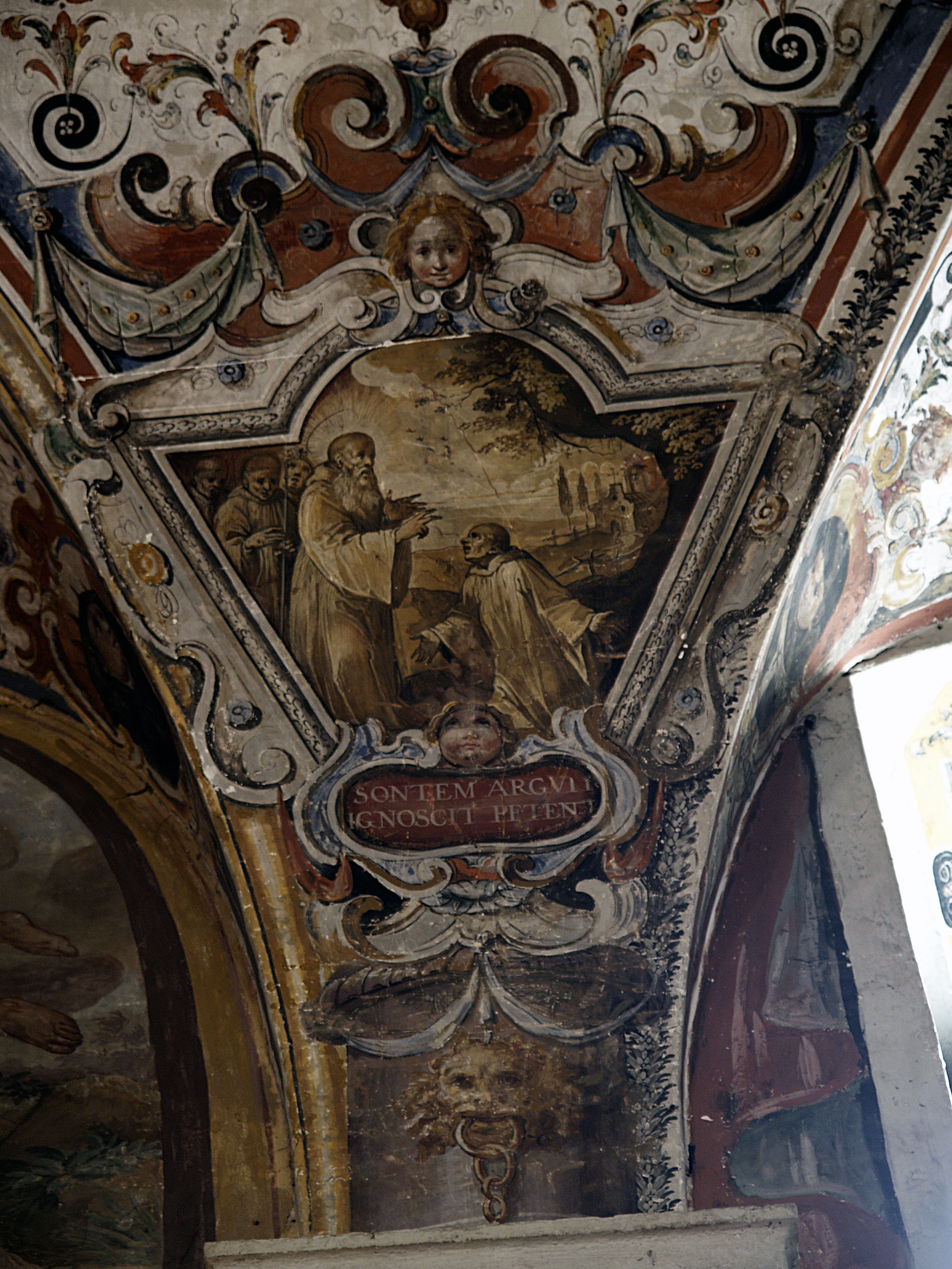 Oratorio della Confraternita di San Benedetto Particolare della Volta dipinta da Matteuccio Salvucci (1610) , dipinta a grottesche con brani della vita di S Benedetto, dipinti a monocromo (color seppia) su sfondo di paesaggi miniaturali. Lo stile è derivante dai fiamminghi del Cinquecento, quali P. Brill . This is a photo of a monument which is part of cultural heritage of Italy.